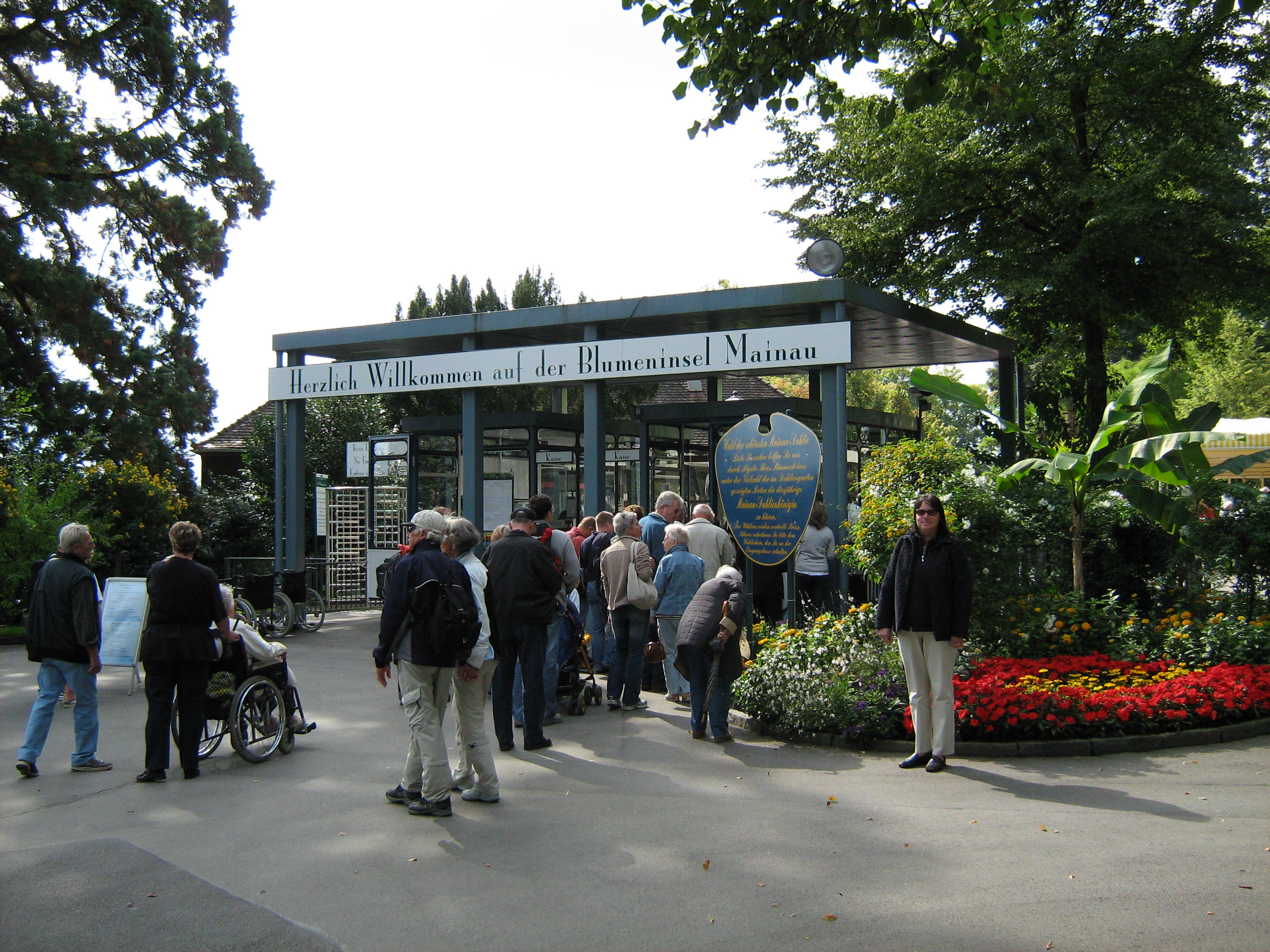 Eingangsbereich vom Schiff auf die Insel Mainau